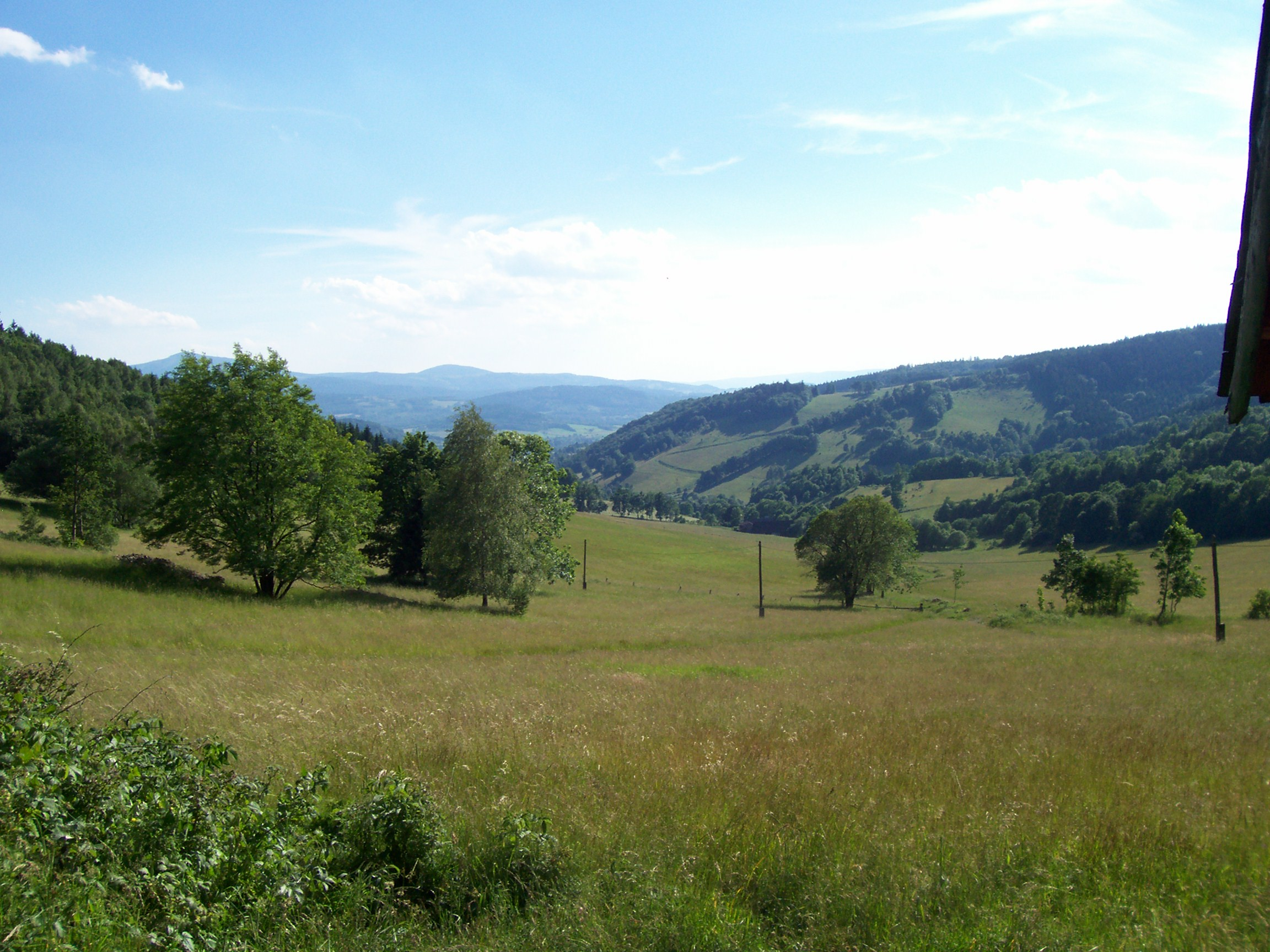 Widok z przełęczy Lądeckiej na stronę polską